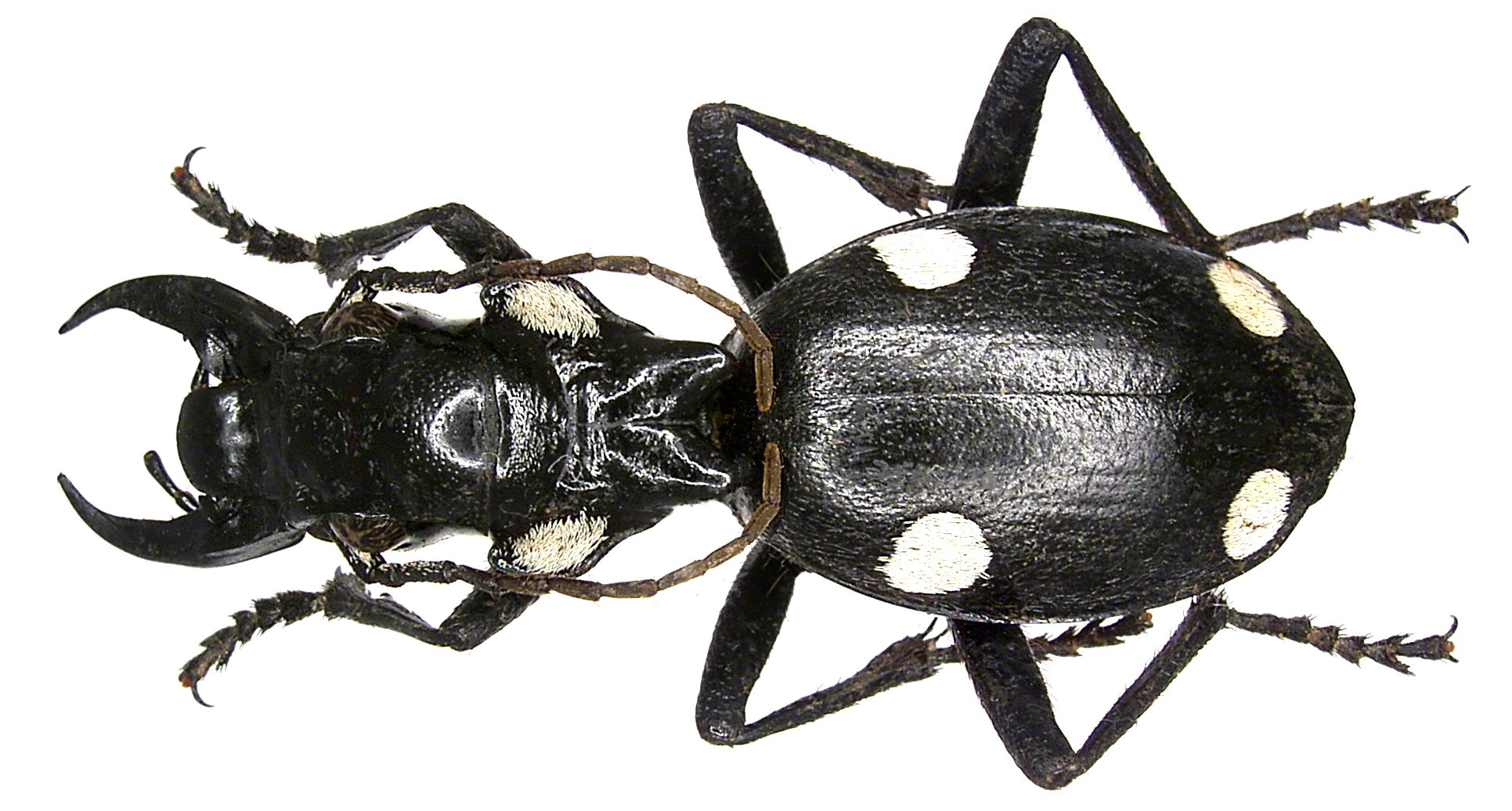 Familie: Carabidae Grösse: 45 mm Fundort: Turkmenia, Finuza leg.1992 Foto: U.Schmidt, 2006